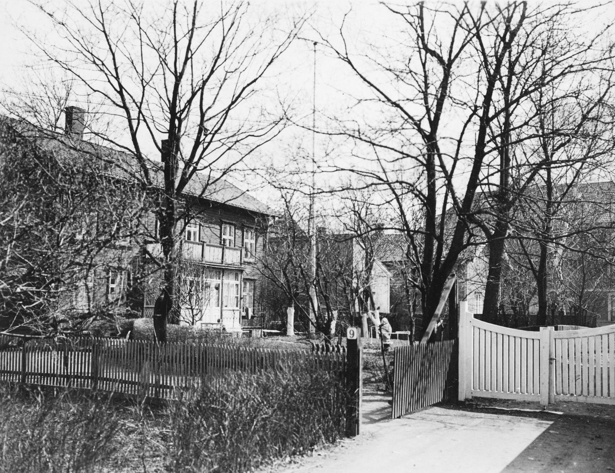 Industrigata 9 (revet), fotografert i 1932. Fra Byhistorisk samling hos Oslo Museum.